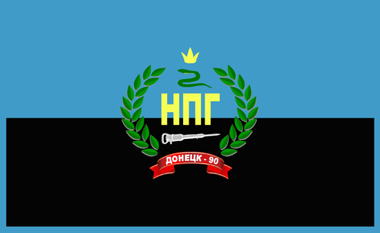 Сцяг НПГБ да 1995 года